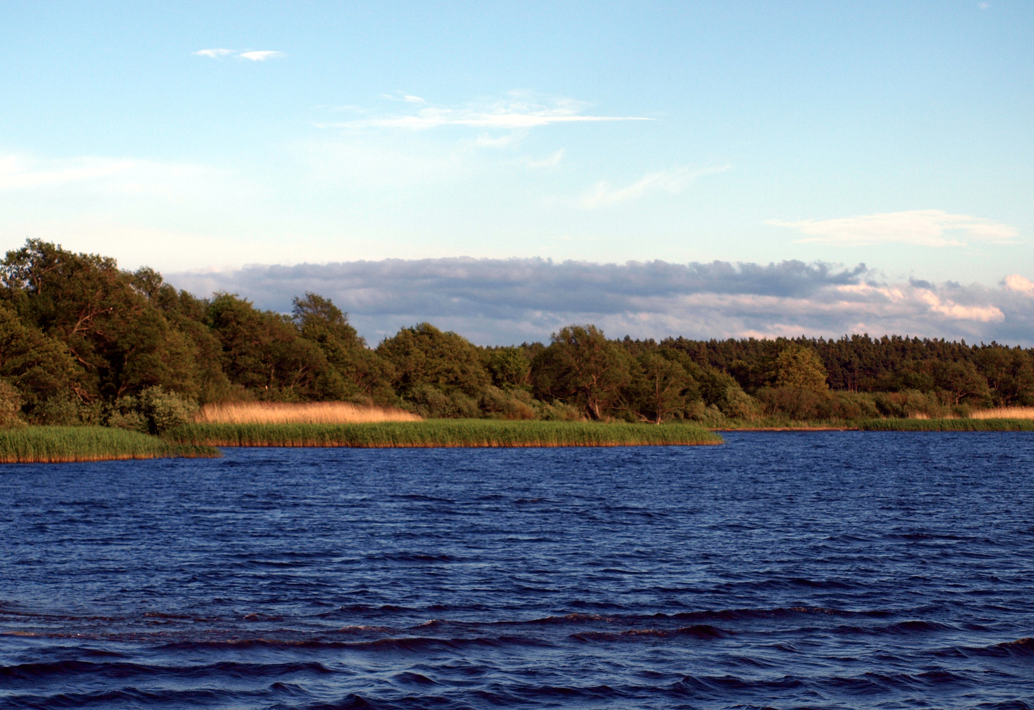 Brzeg jeziora Łebsko w rejonie Izbicy.